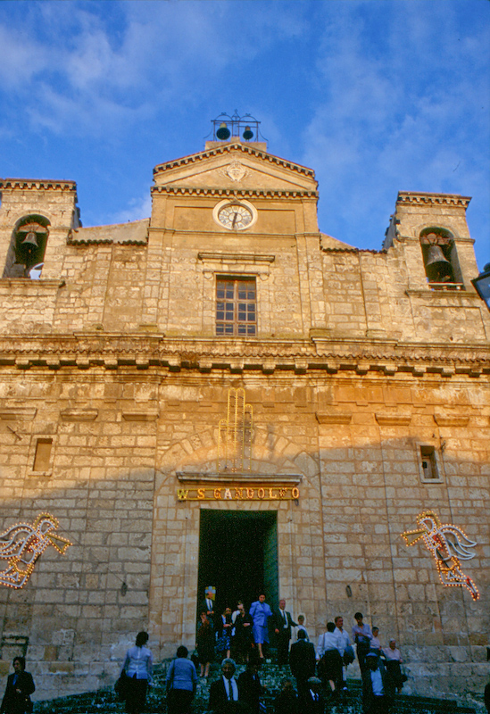 The church during san Gandolfo festival, Polizzi Generosa, provincia di Palermo, Italy